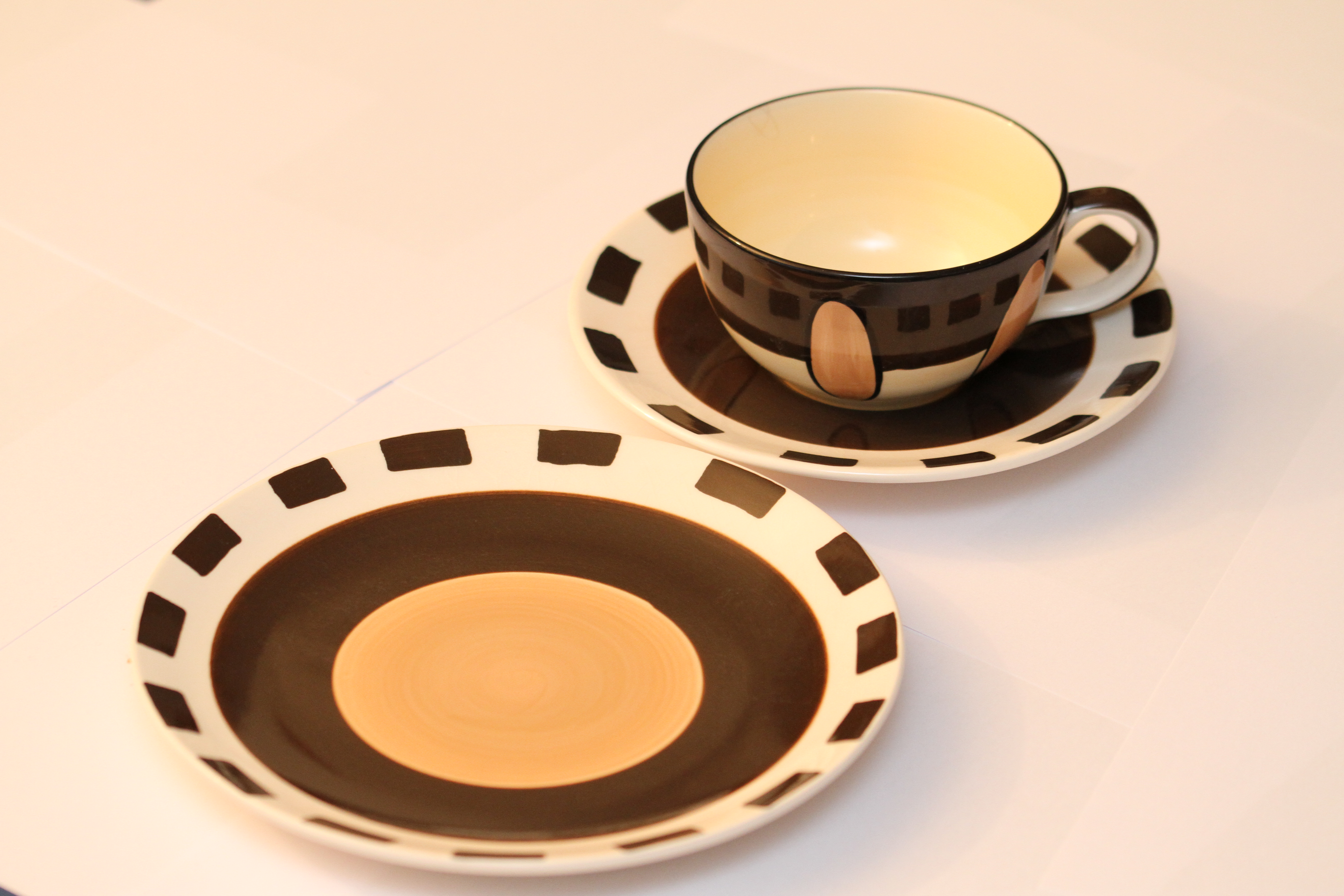 To asjetter.